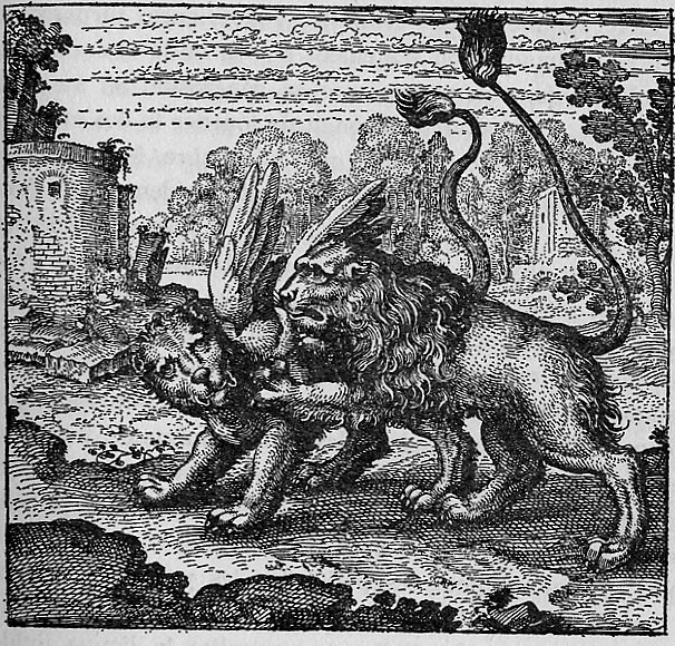 Emblem 16